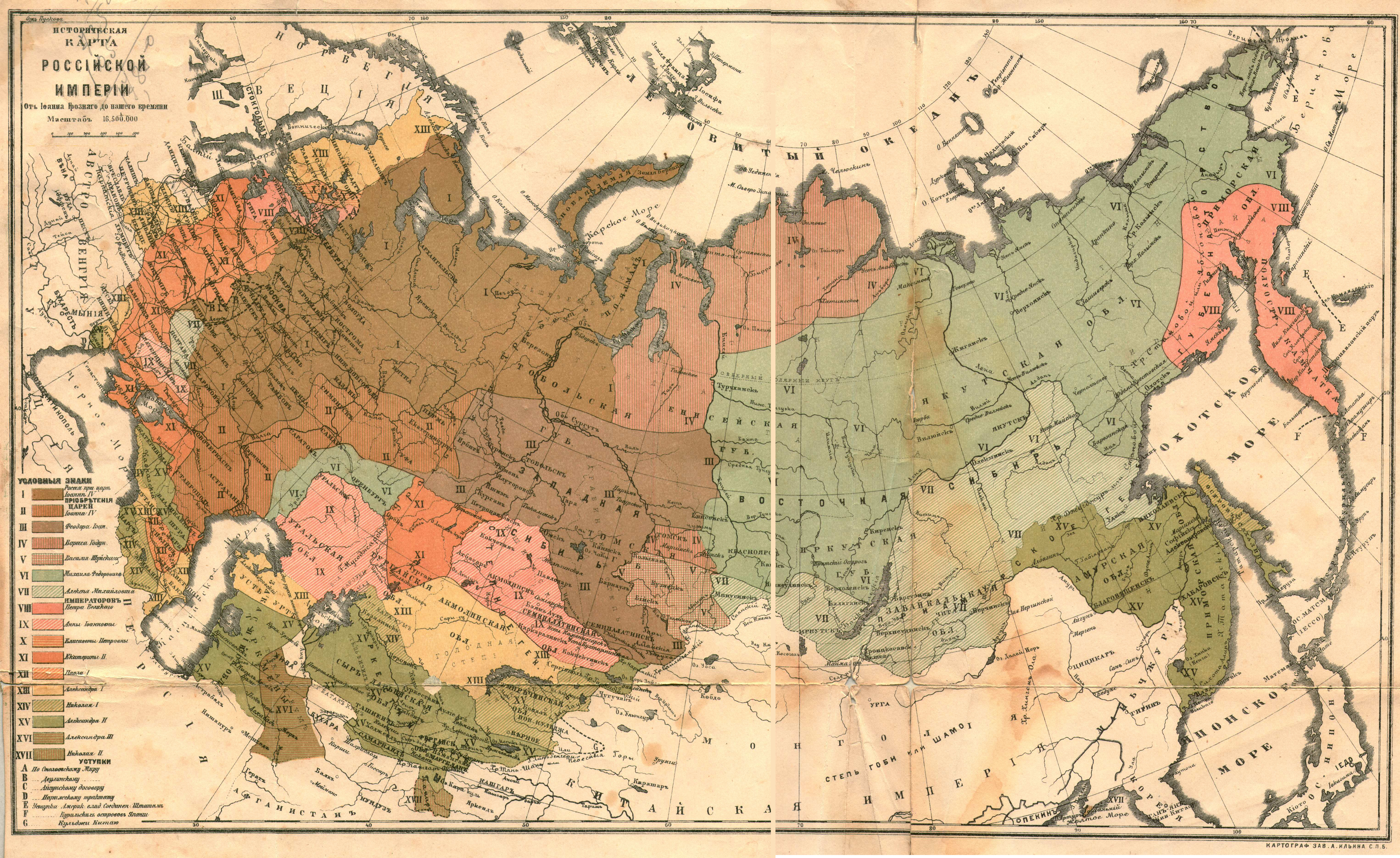 Территориальный рост Российского государства от Ивана Грозного